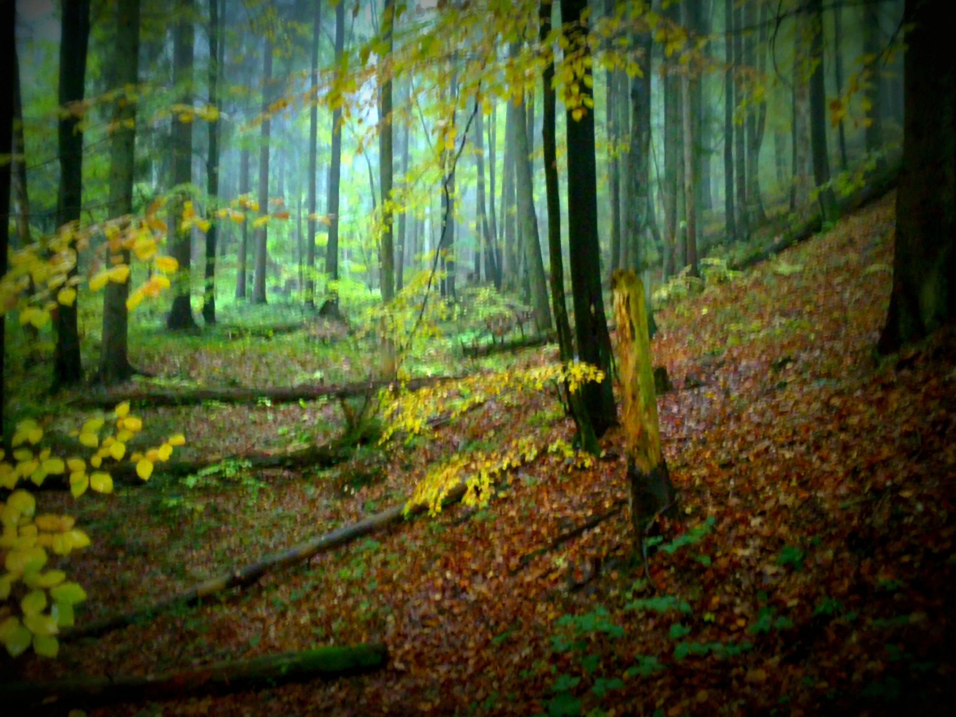 Pohľad do Badínskeho pralesa.